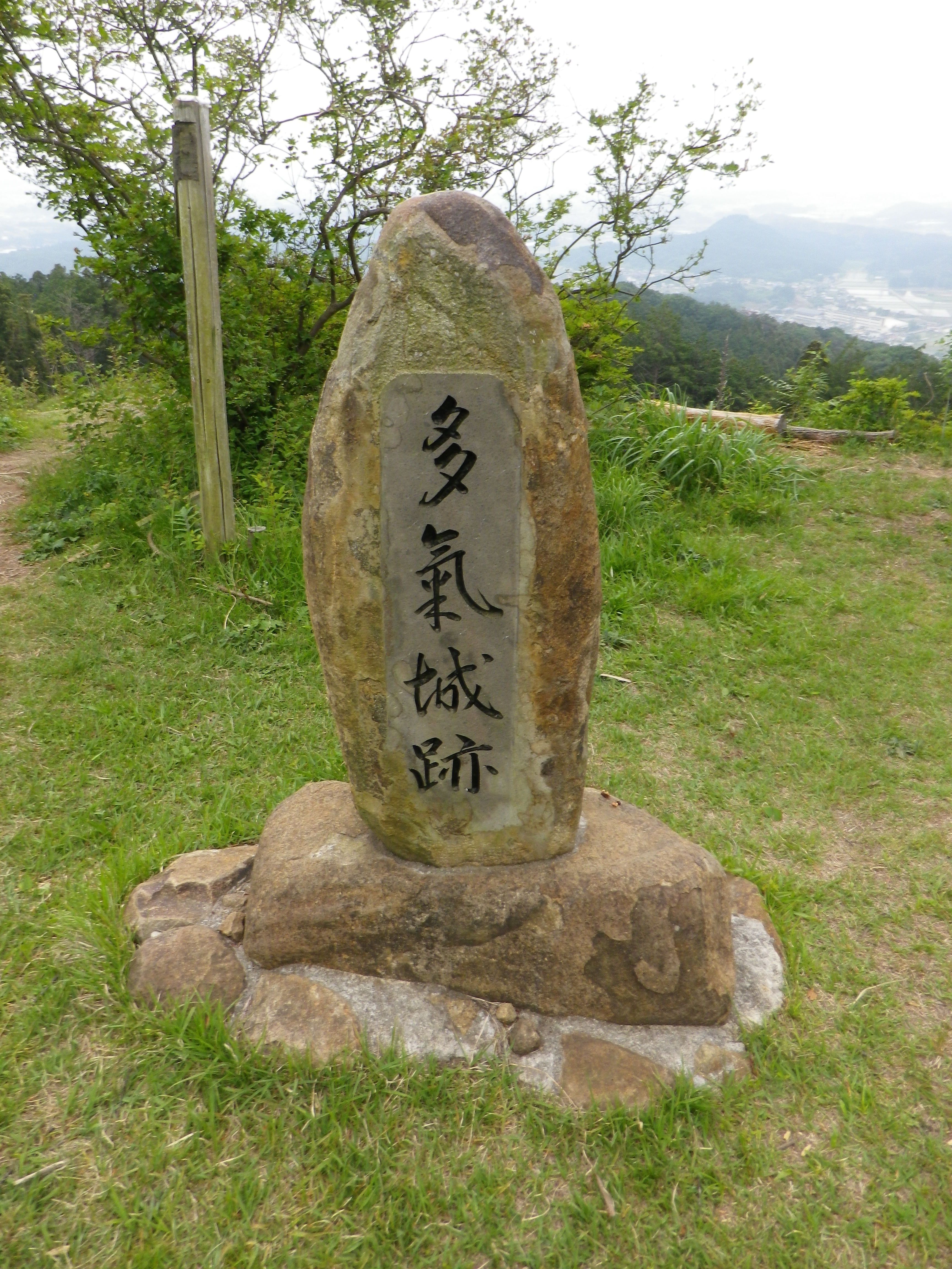 多気城跡碑